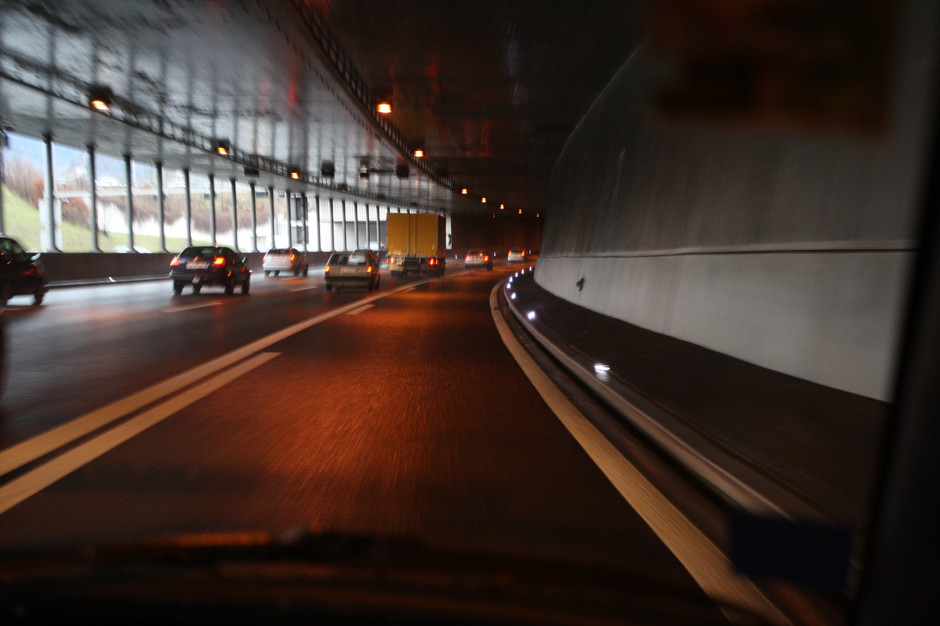 Autobahnauffahrt Neuenhof